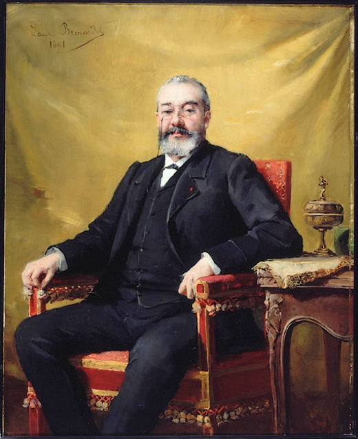 Adrien Proust, huile sur toile par Laure Brouardel, signé et daté en haut à gauche, 1891. Musée Carnavalet, Paris